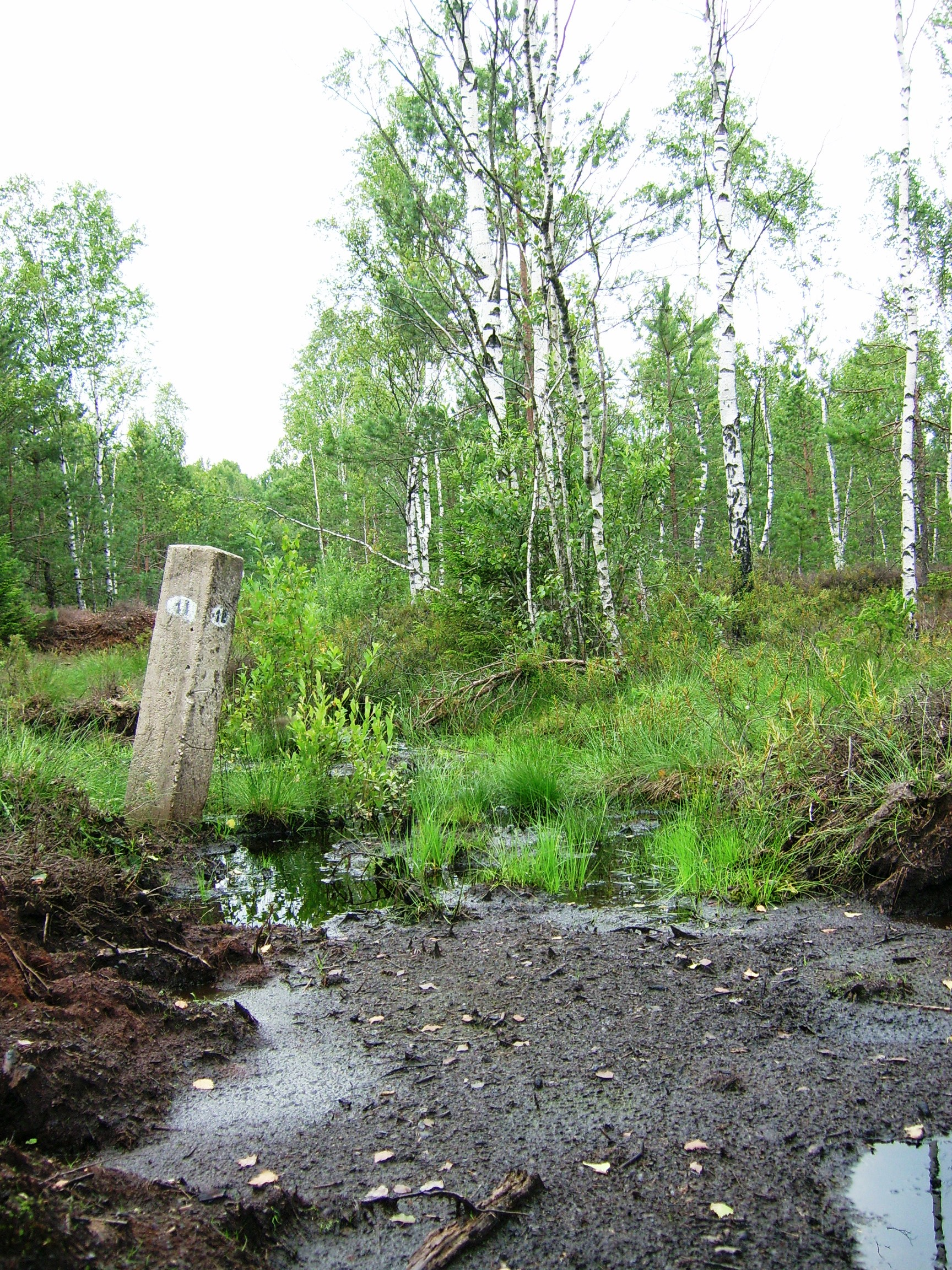 Leoniškės plynoji